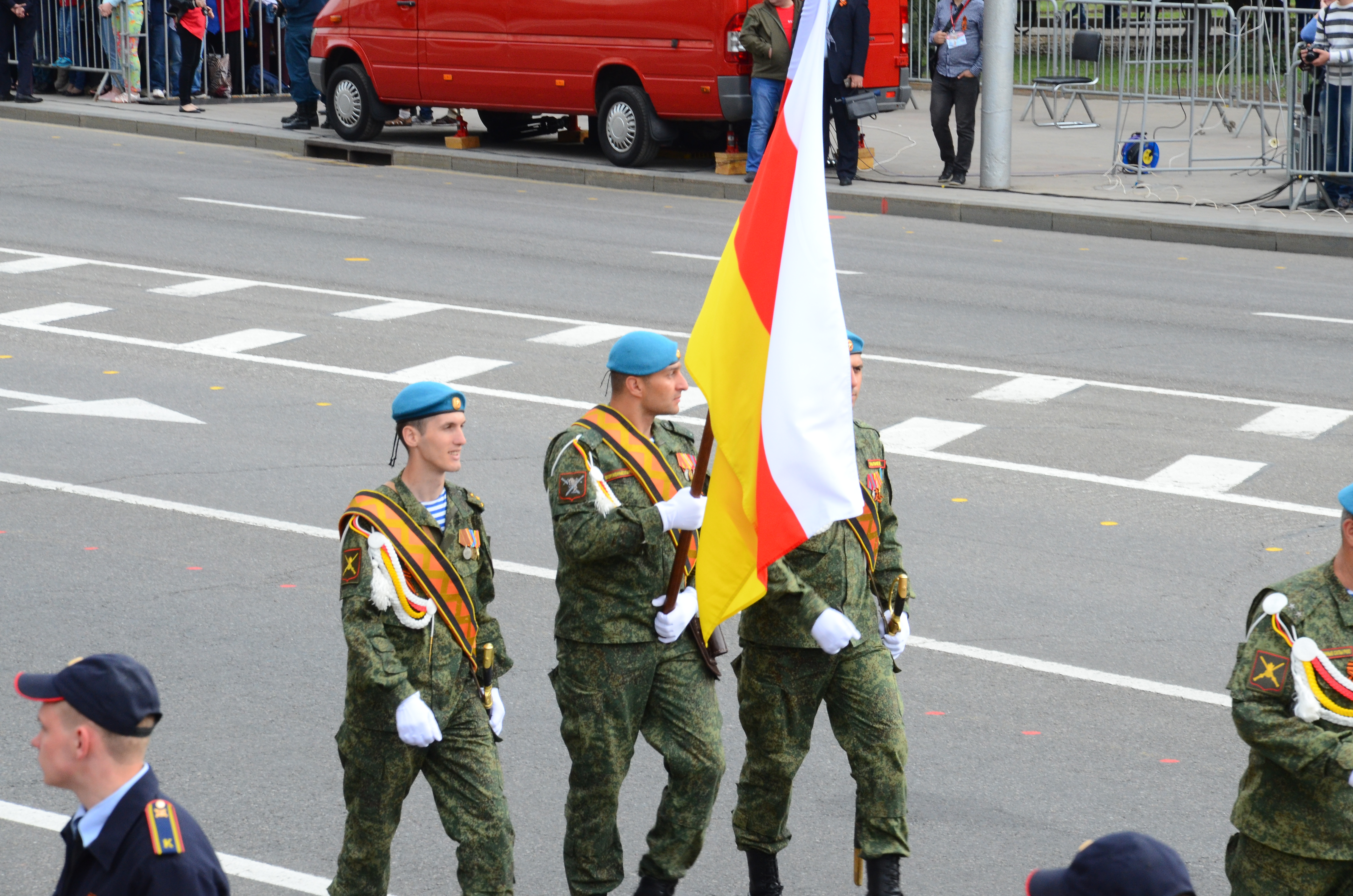 День Победы в Донецке